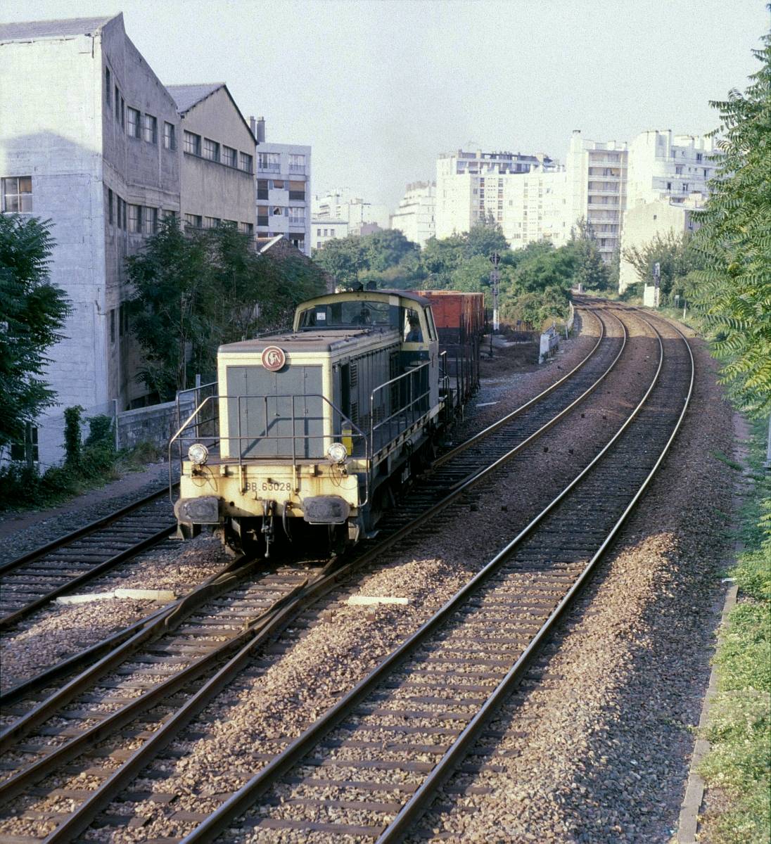 Un train de marchandises en provenance de la gare de Reuilly, s'engage sur la Petite Ceinture par le raccordement de Bel-Air dans le 12e arrondissement de Paris le 25 septembre 1985.